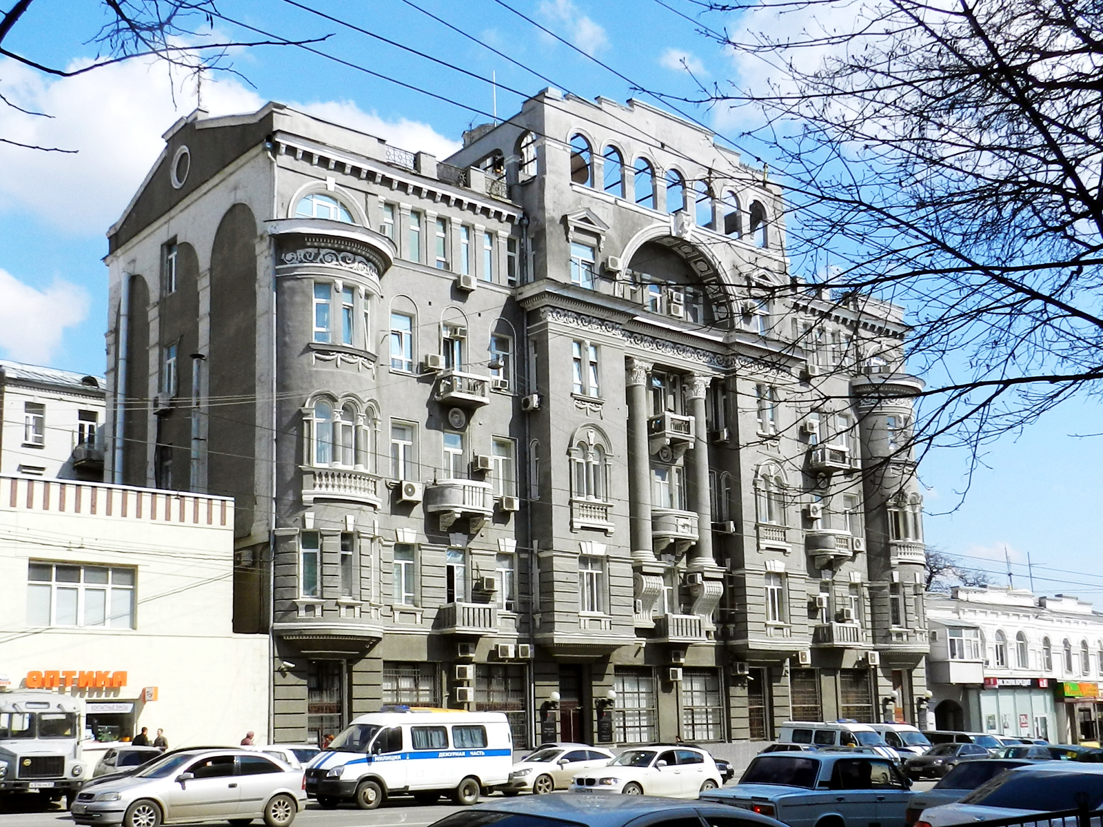 Доходный дом Чирикова, Ростов-на-Дону